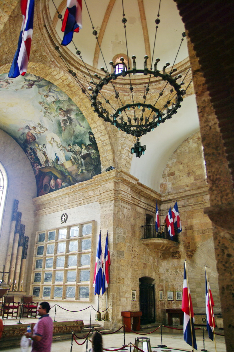 Panteon Santo Domingo